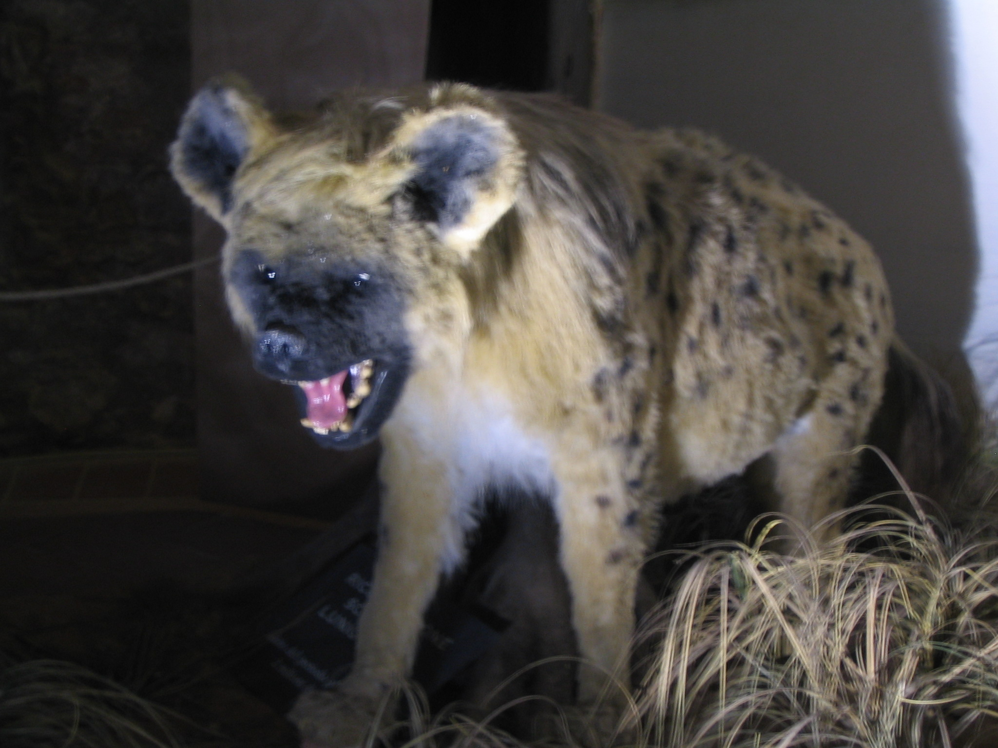 A cave hyena model